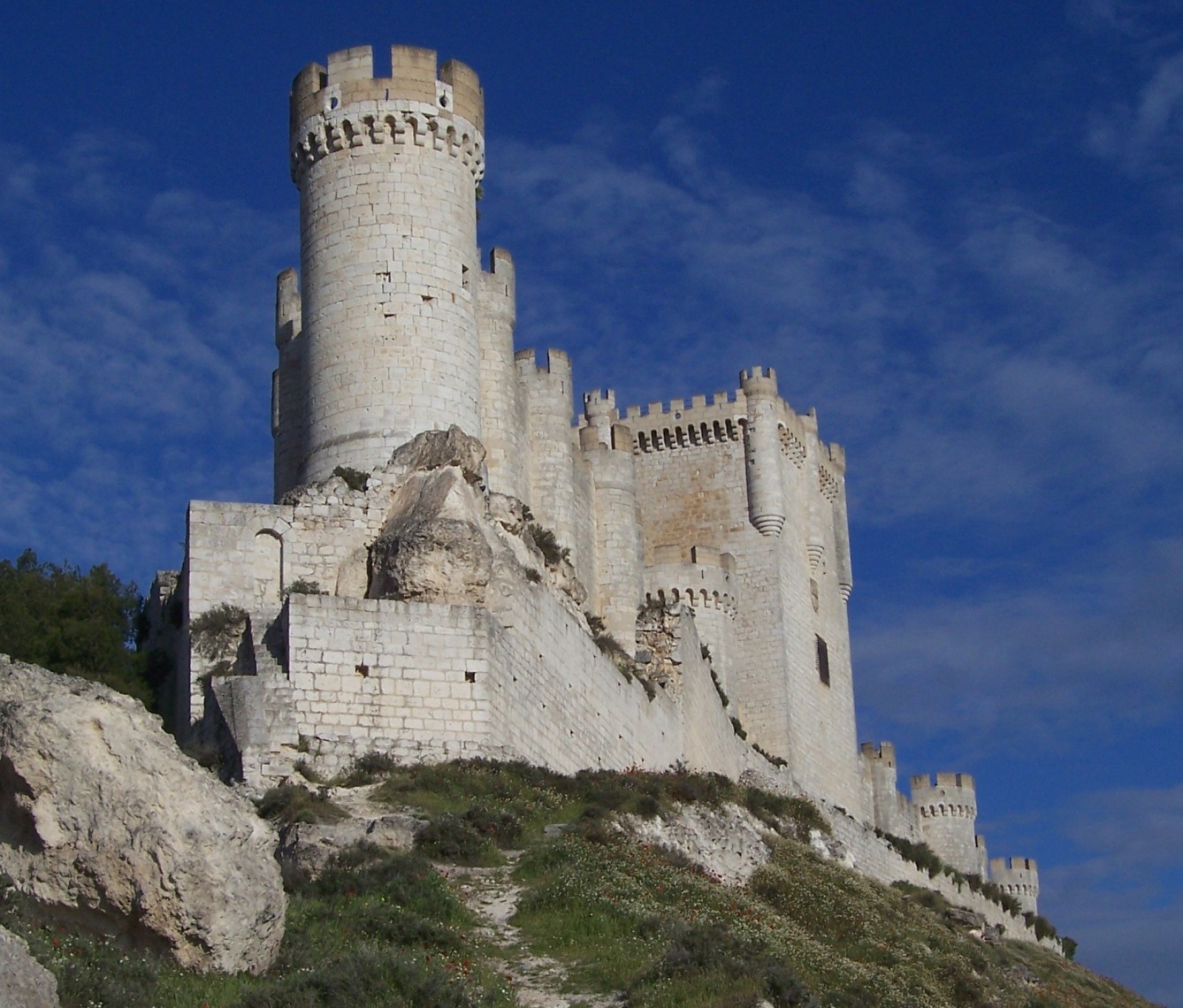 Castillo de la Villa de Peñafiel (España)